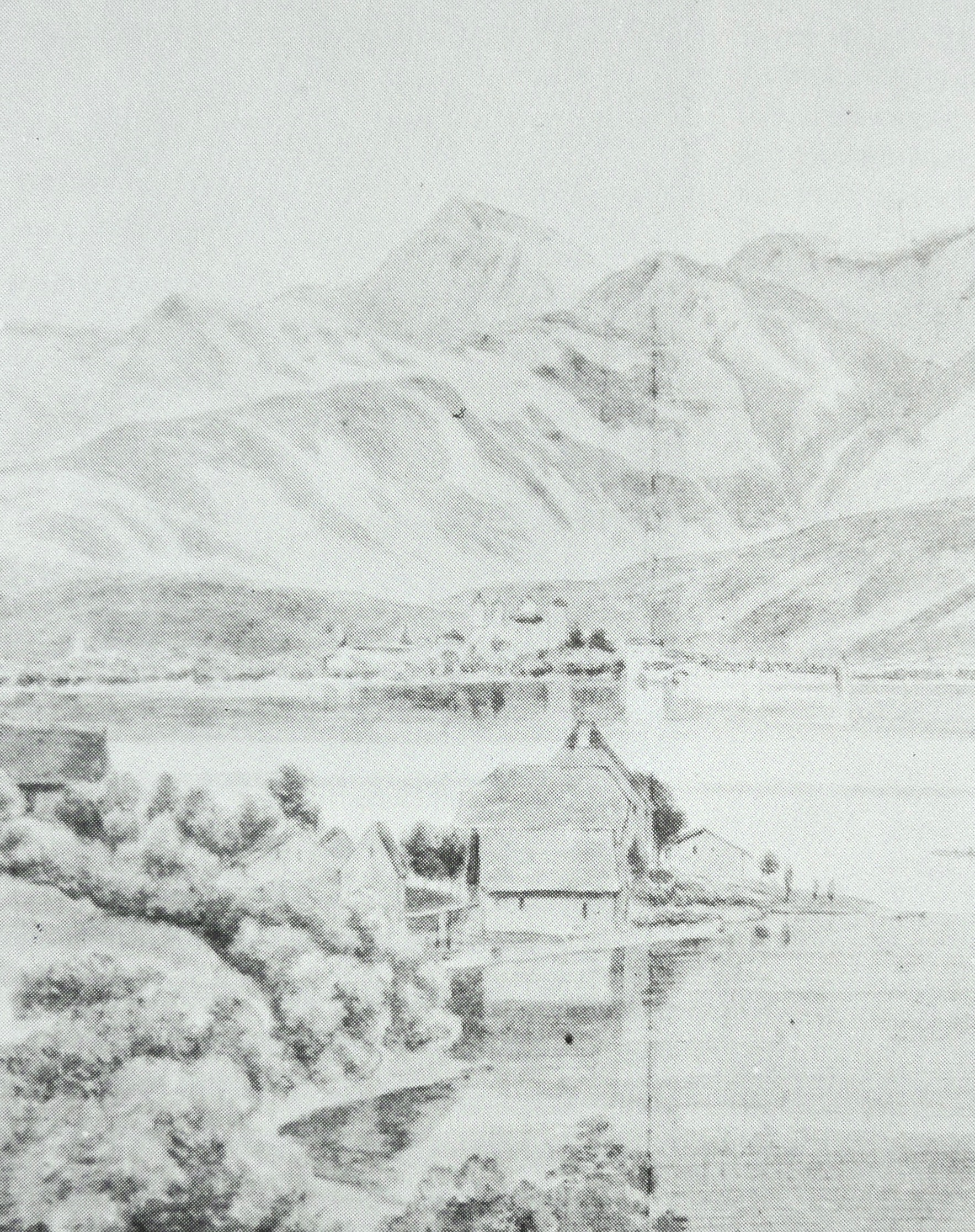 Ritterhäuser Uerikon